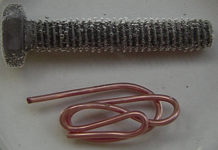 Iron e copper acid attack